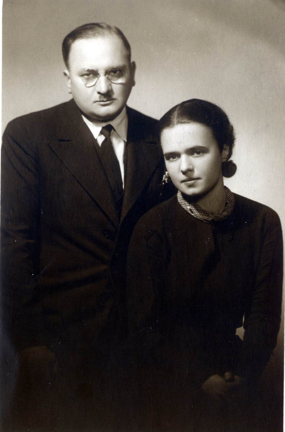 Сергей Семёнович Маслов (1 ноября 1887—1945?) эсер, организатор и теоретик кооперации, публицист, член Всероссийского учредительного собрания, управляющий военным отделом Верховного управления Северной области в Архангельске со 2 августа по 20 сентября 1918, лидер эмигрантской «Крестьянской России — Трудовой крестьянской партии» с его женой Ией, урождённой Андрукович.